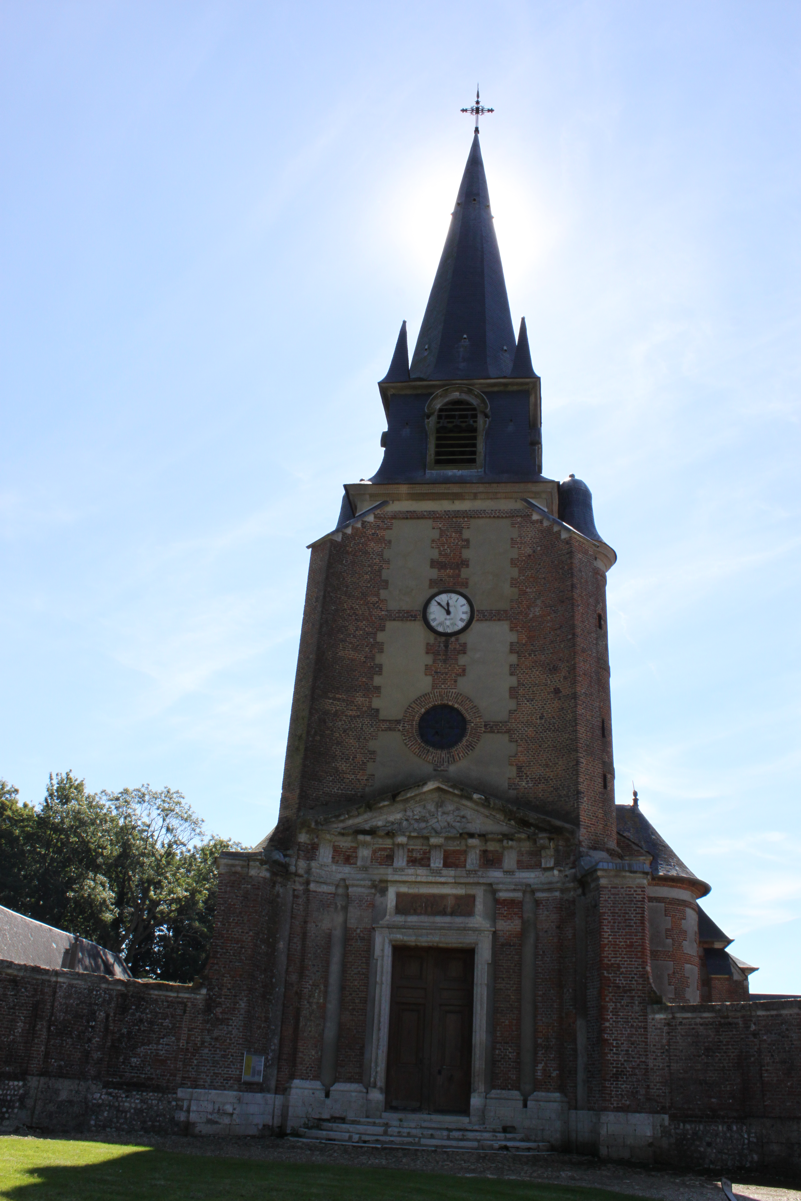 Eglise de Grémonville